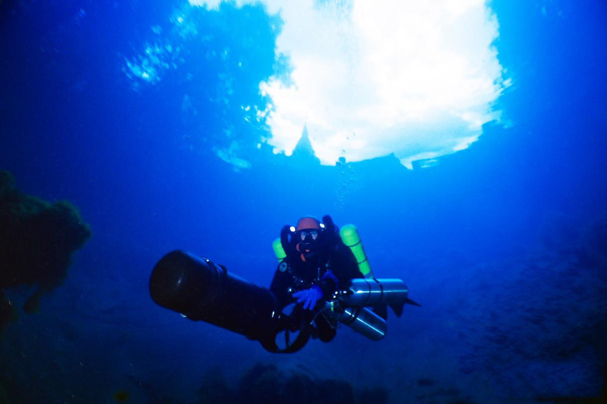 Blautopfhöhle - Taucher im Blautopf (Taucher: Jochen Malmann)